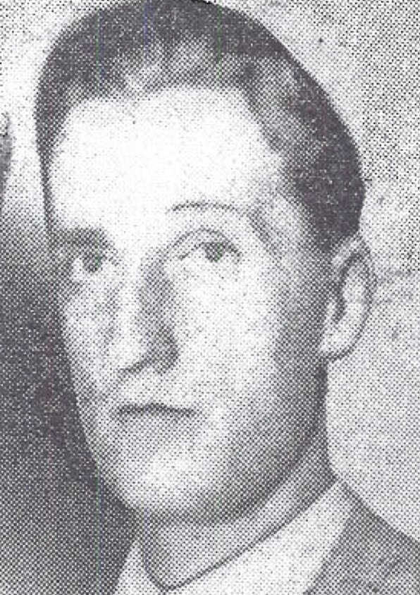 Giorgio Nelson Page, giornalista statunitense naturalizzato italiano.